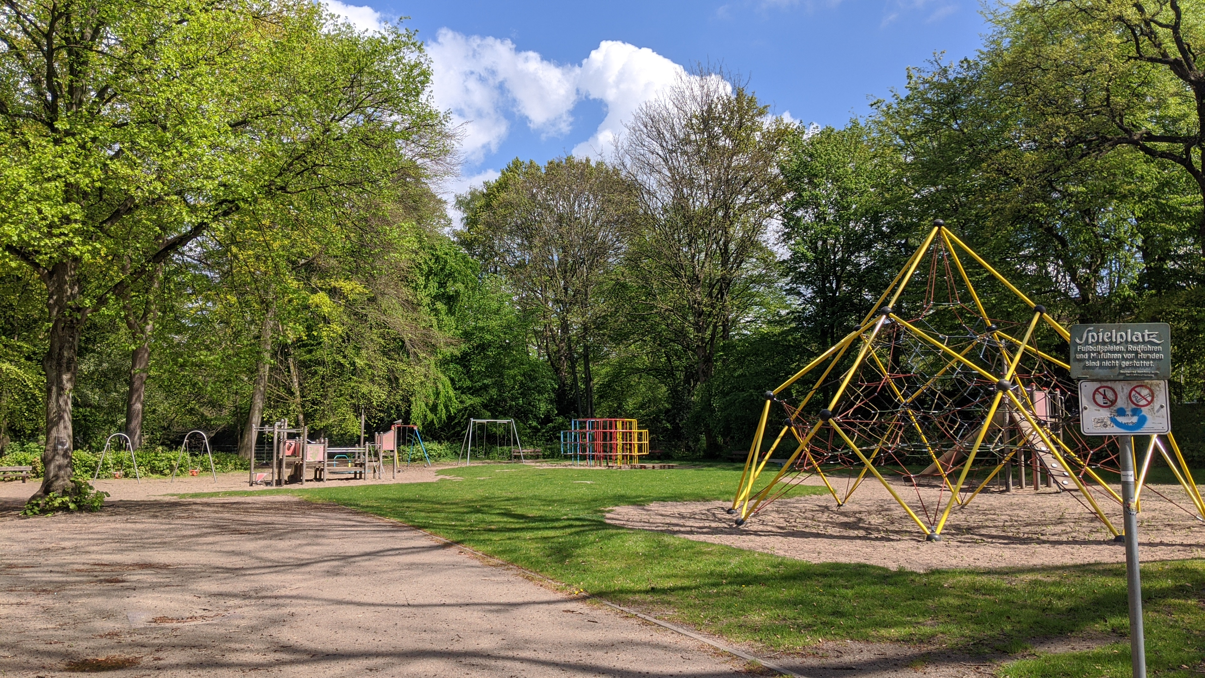 Hammer Park in Hamburg-Hamm, leerer Spielplatz während der Corona-Pandemie, Frühjahr 2020